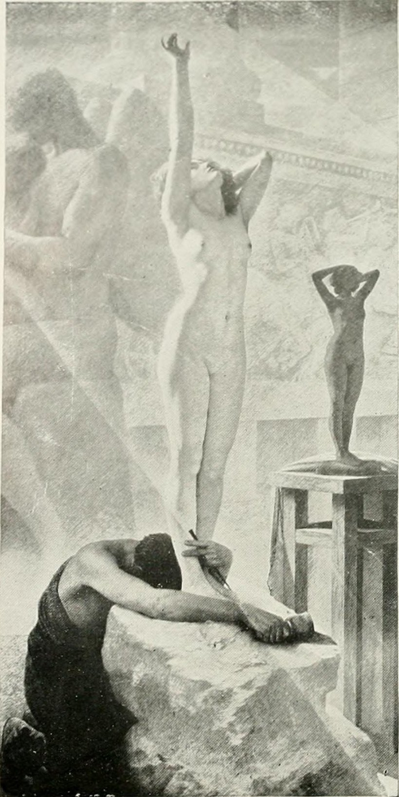 L'éveil de Galatée